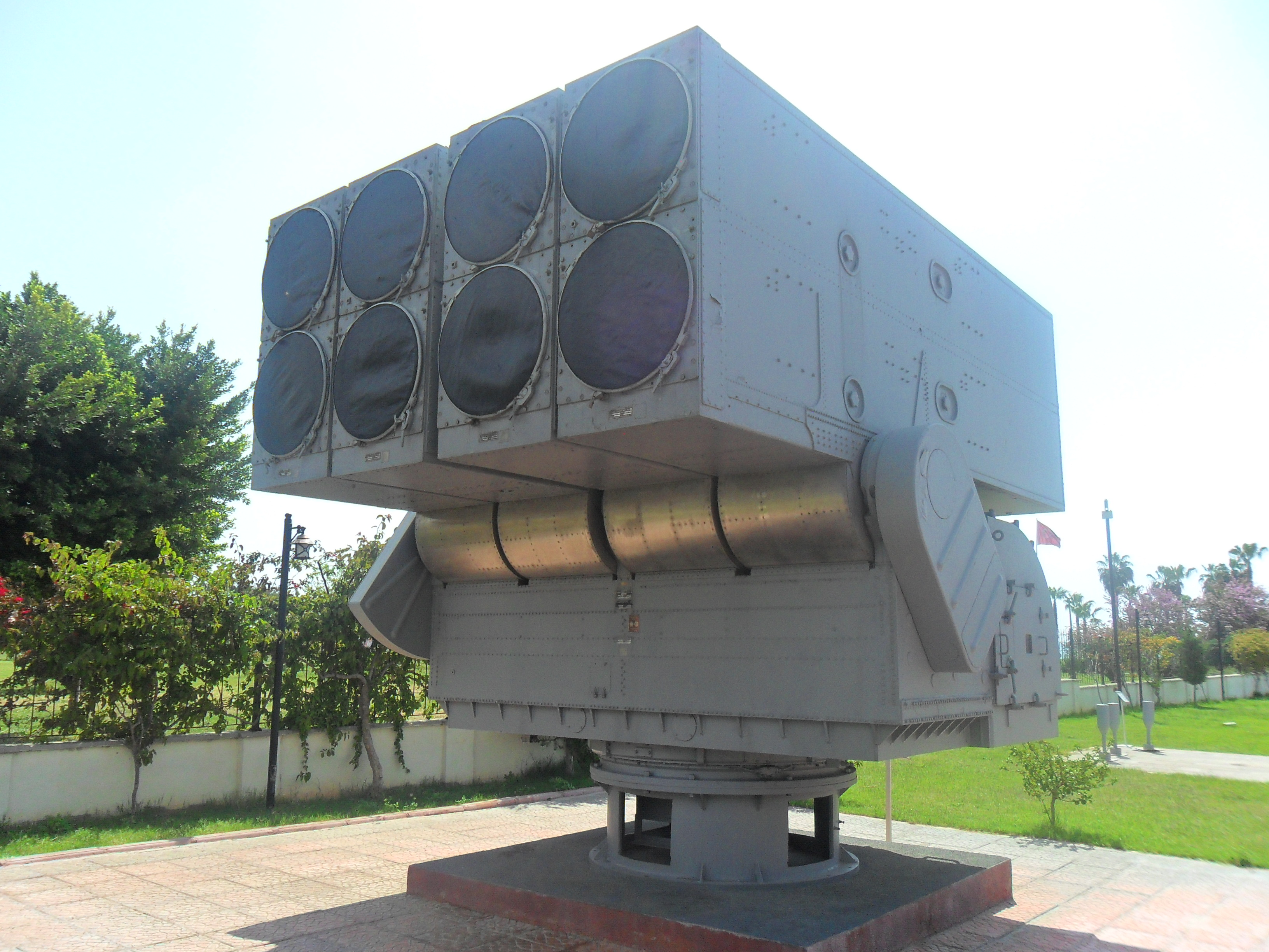 Mersin Deniz Müzesinde sergilenmekte olan Amerikan Lockheed Martin üretimi roketli torpidonun arka kısmı.